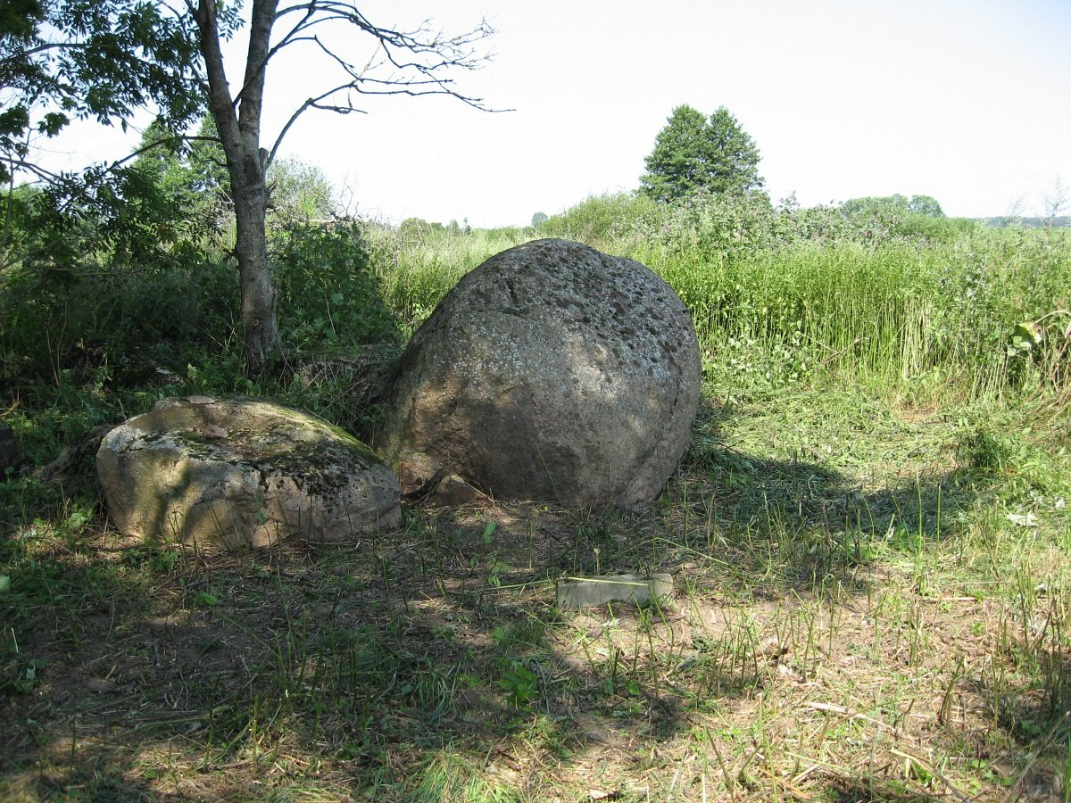 Зарэчча. Зарэчанскі валун